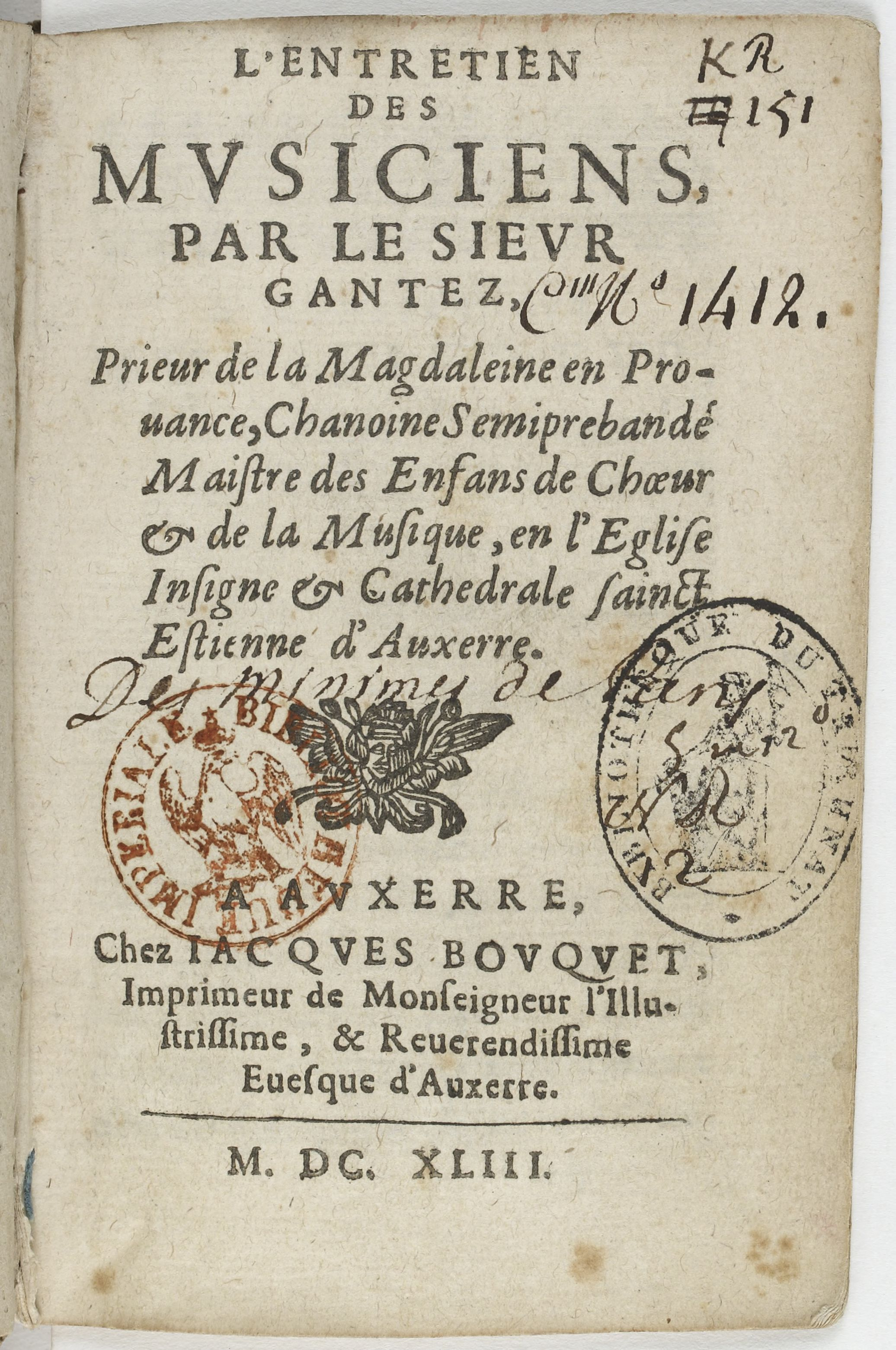 Page de titre de L'Entretien des musiciens d'Annibal Gantez (Auxerre : 1643). Paris BNF.